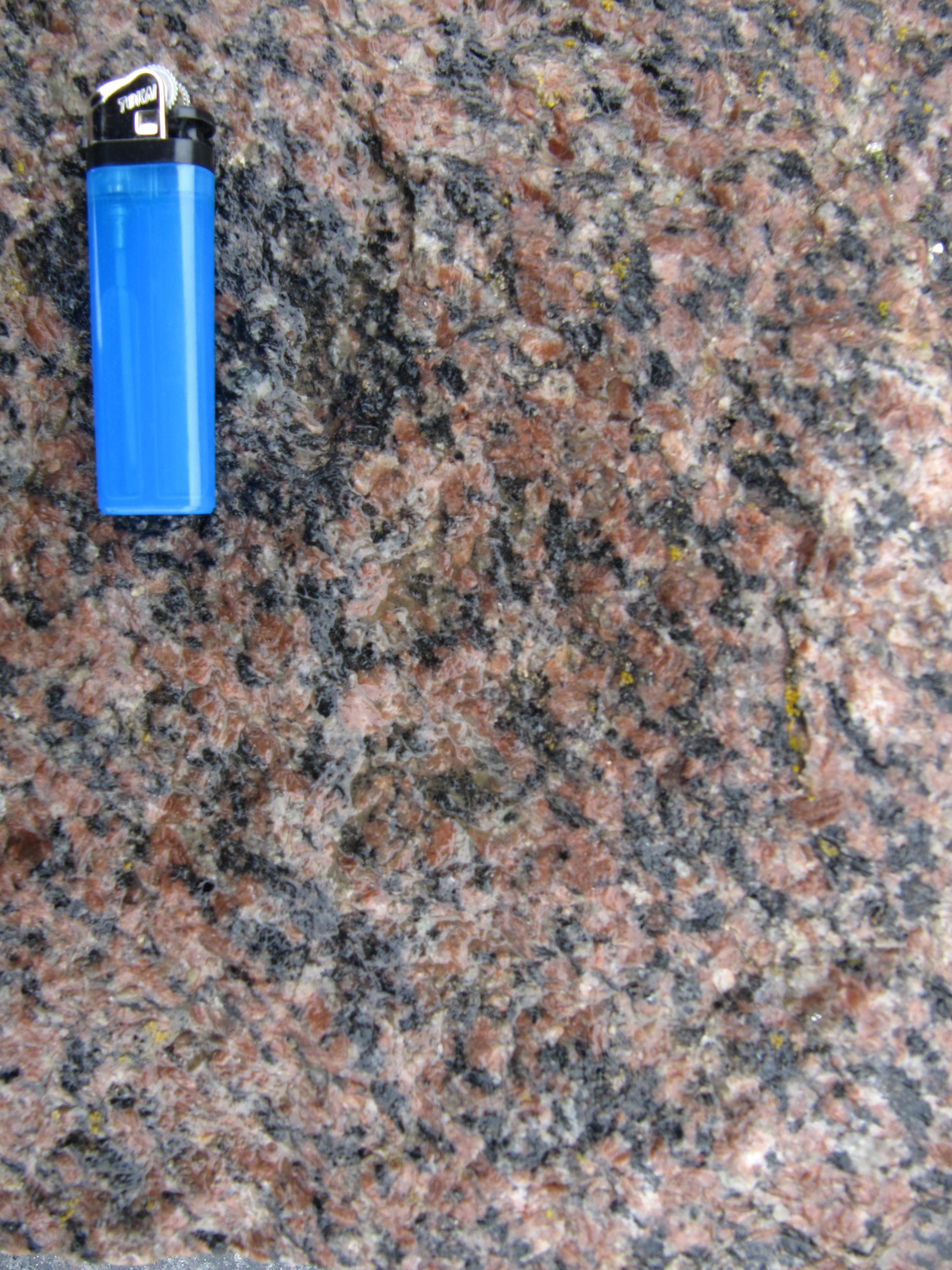 Hugget flade i Svaneke granit; lighter er 8 cm